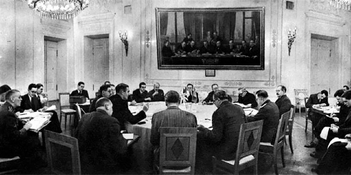 Московская конференция 1943 года. За круглым столом сидят: министр иностранных дел СССР Вячеслав Молотов, Маршал Советского Союза Климент Ворошилов, генерал-лейтенант Гастингс Исмей (Великобритания), посол Великобритании в СССР Арчибальд Керр, министр иностранных дел Великобритании Энтони Иден, заместитель министра иностранных дел Великобритании Уильям Стрэнг, генерал-майор Джон Дин (США), посол Соединенных Штатов Америки Аверелл Гарриман, госсекретарь США Корделл Халл, советник госсекретаря США Грин Хэкфорт, заместители наркома иностранных дел СССР Максим Литвинов и Андрей Вышинский